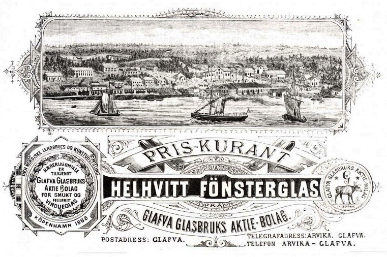 Glava Glasbruks prikurant